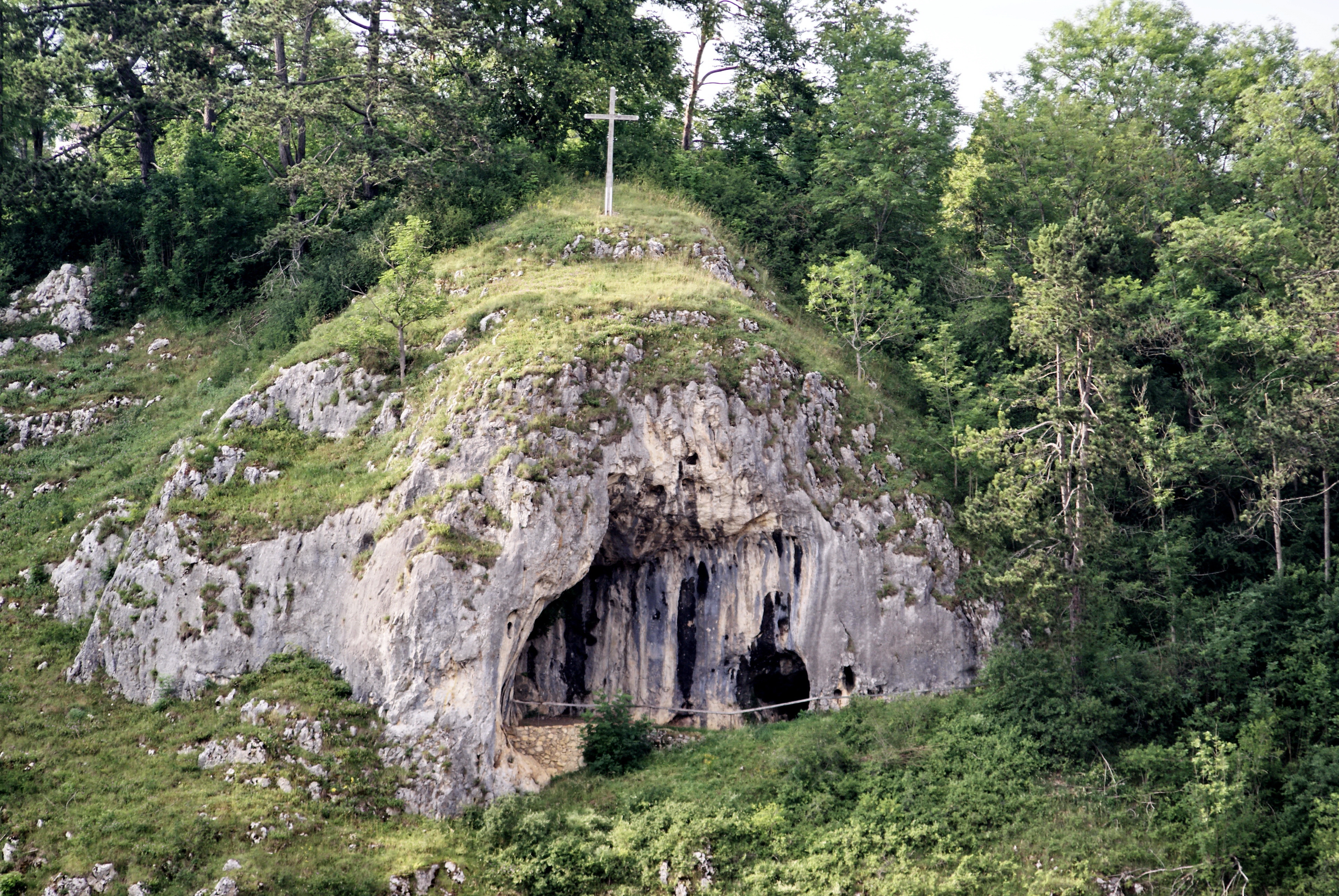 Die Göpfelsteinhöhle liegt auf einer Höhe von 660 m ü. NN am westlichen Stadtausgang von Veringenstadt, rechts oberhalb der Lauchert und der Altstadt. Der Eingang ist nach Süden ausgerichtet und weithin sichtbar in einem massigen Felsen des Weißen Jura.